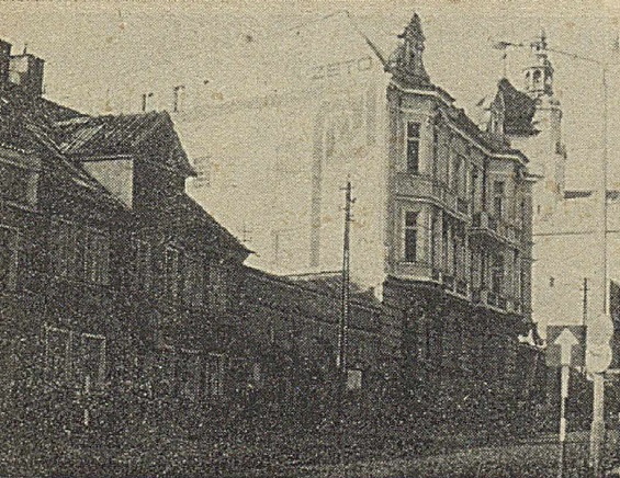 Olsztyn, ZETO